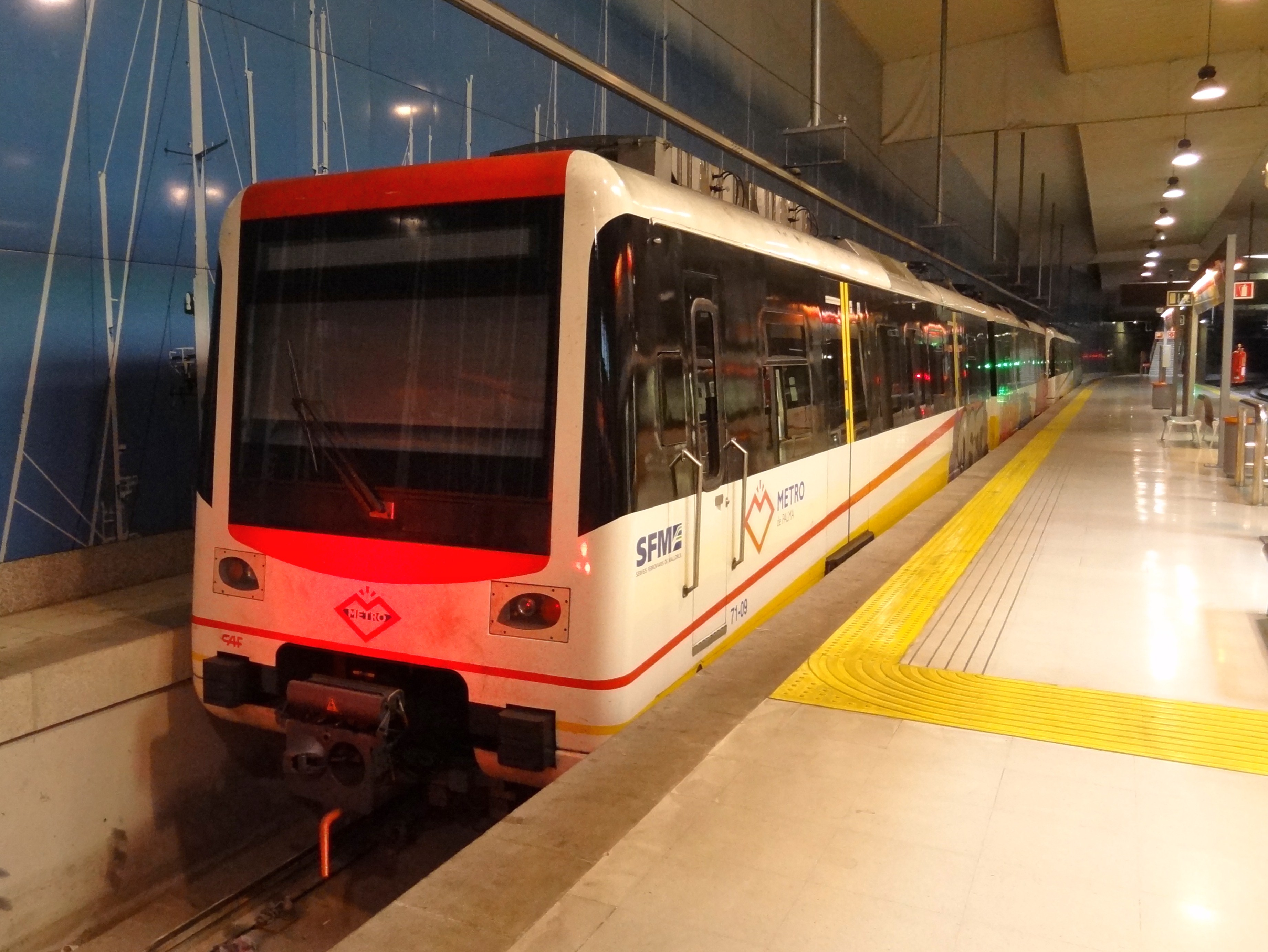 Estació Intermodal an der Plaça de Espanya in Palma, Mallorca, Spanien